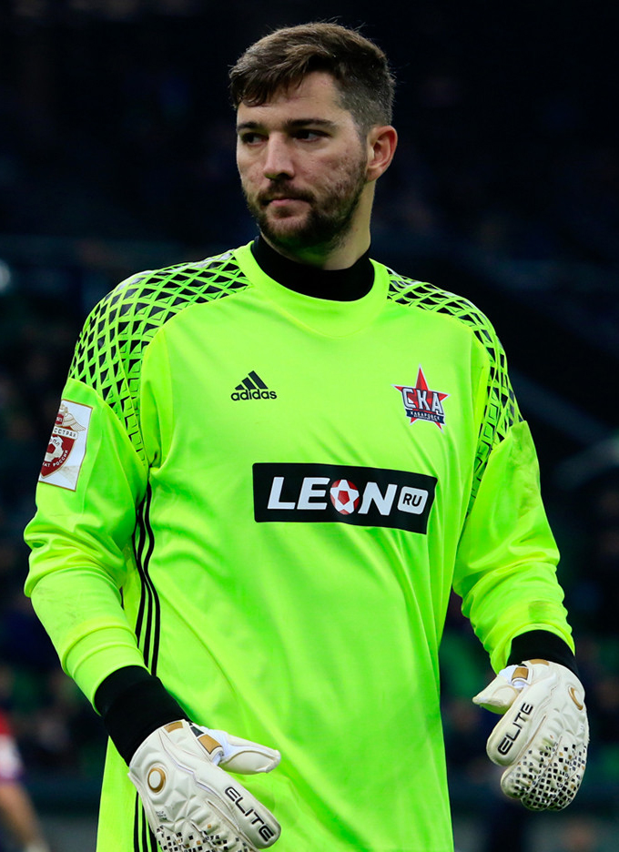 «Краснодар» - «СКА-Хабаровск»